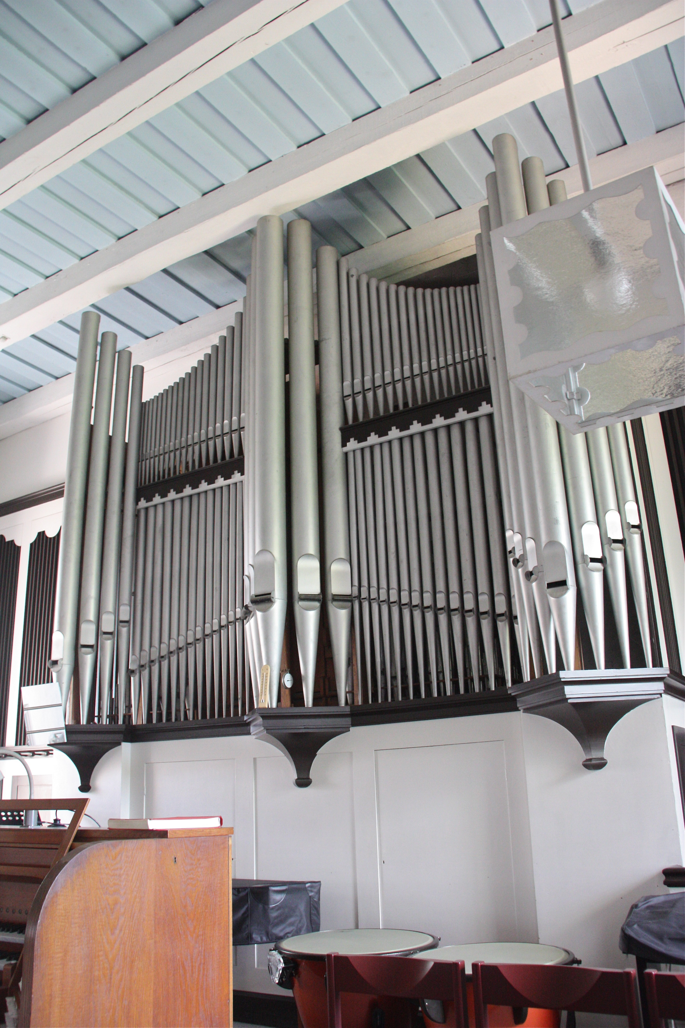 Kellinghusen, Kirche St. Cyriacus, Orgel